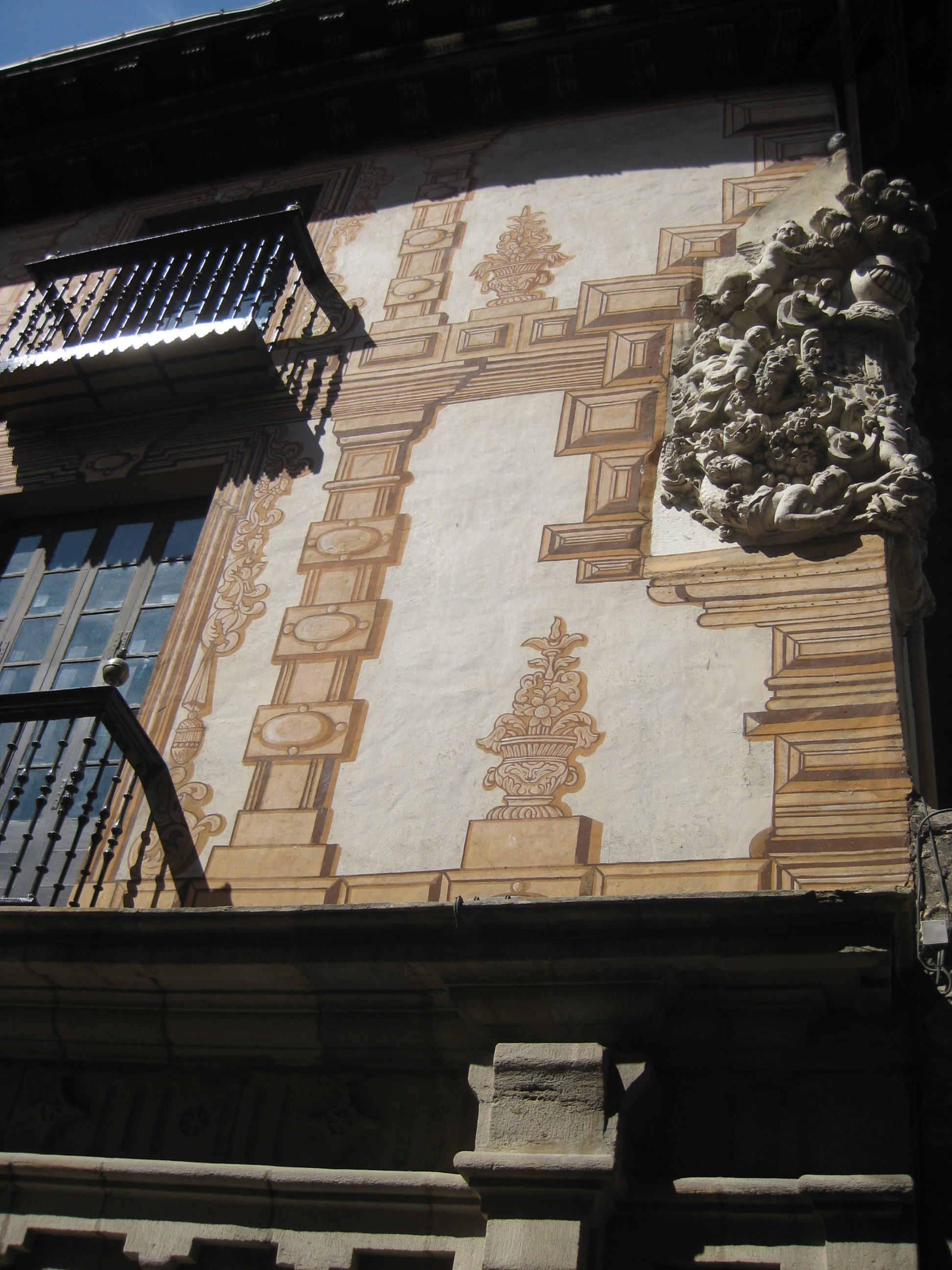 Palacio en el Casco Medieval de Vitoria-Gasteiz